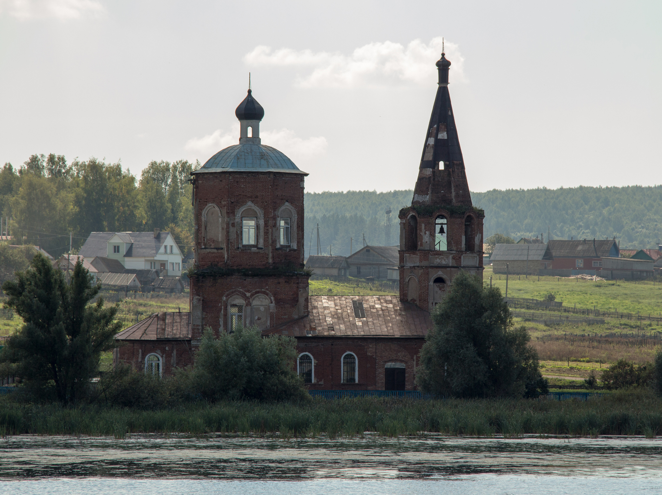 Троицкая церковь (Республика Башкортостан, Туймазы, село верхне-троицкое)